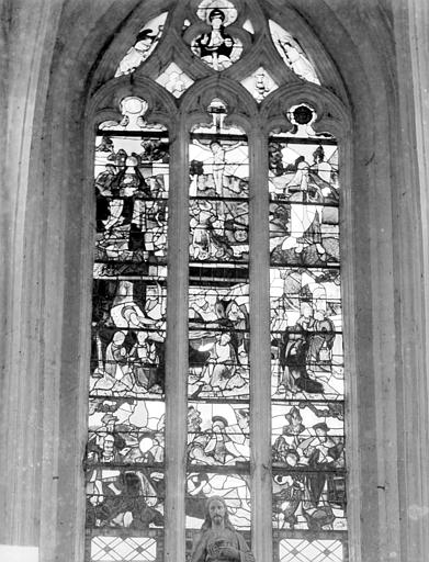 Vitrail